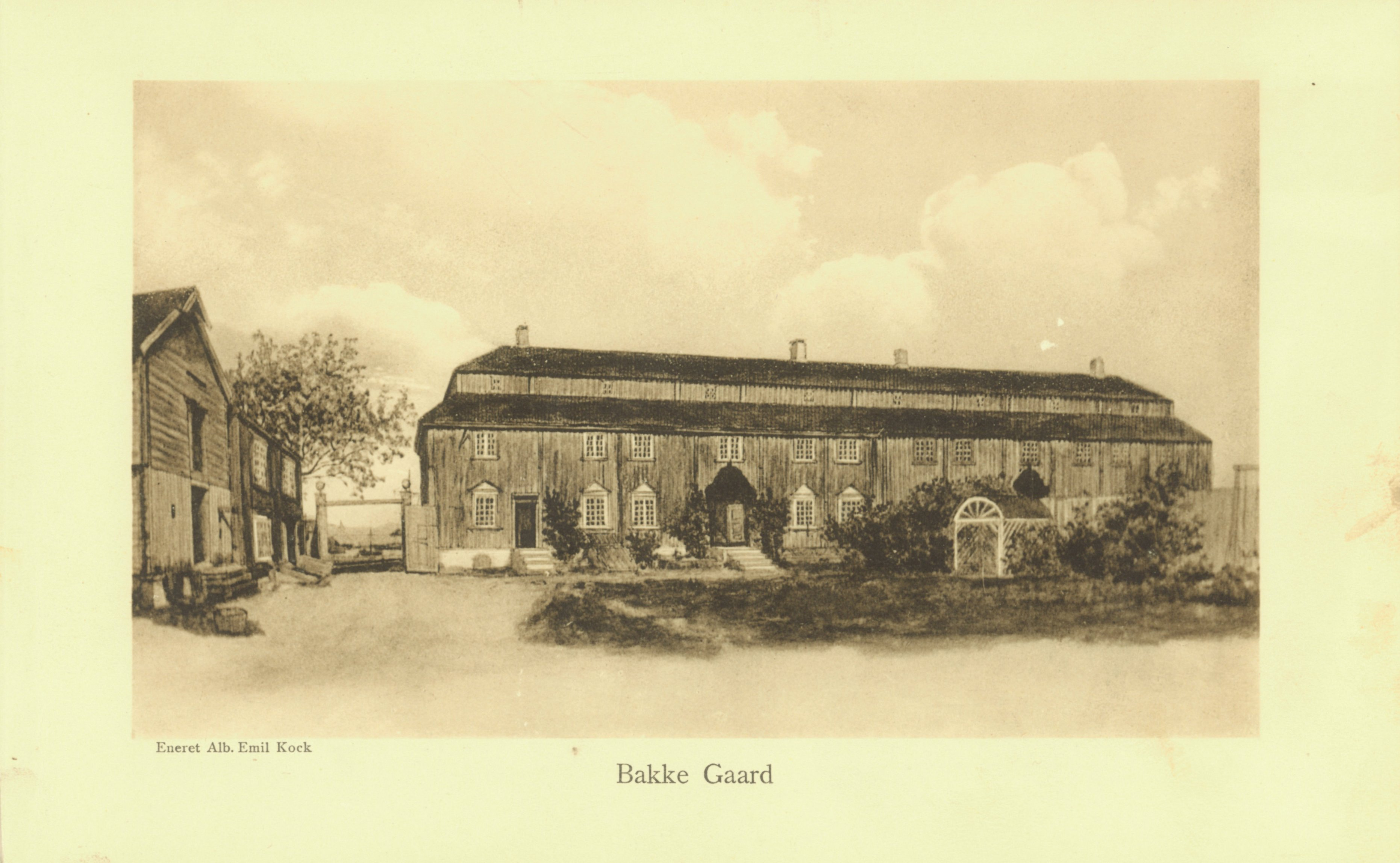 Format: Trykk Kunstner / Artist: Trykket er basert på en akvarell malt av Mathilde Müller (d. 1873); merket Eneret Alb. Emil Kock. Dato / Date: [før 1834] Sted / Place: Bakke gård, Trondheim Google Street View: g.co/maps/q4ps7 (Bakke gård) Wikipedia: Bakke gård Eier / Owner Institution: Trondheim byarkiv, The Municipal Archives of Trondheim Arkivreferanse / Archive reference: Tor.H40.B14.F0984 [T0272] Merknad: Bakke gård slik den opprinnelig var før den ble delt i to like deler i året 1834. Halvdelen til høyre ble revet og istedet oppførtes Rosenborg gård som så ble revet i 1884. Gården ligger på tomta til Bakke nonnekloster.